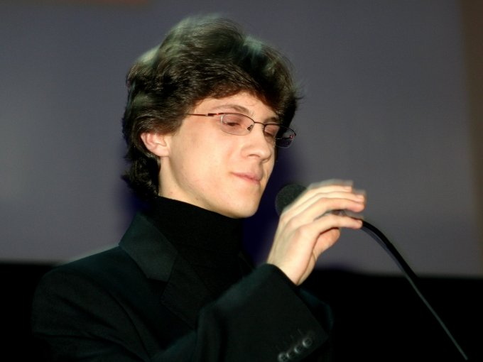 Rafał Blechacz, Polish pianist